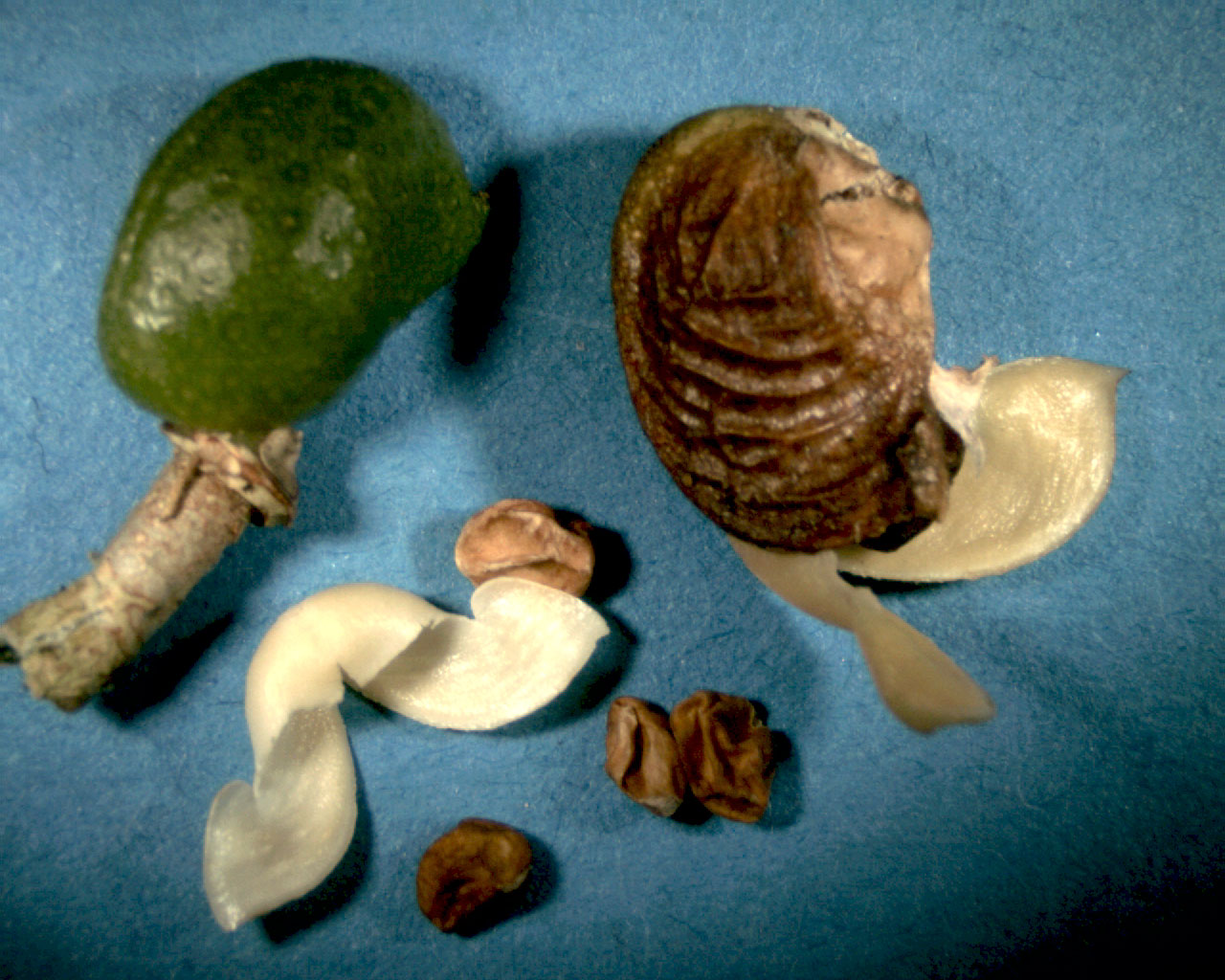 Frucht und Same von Orixa japonica